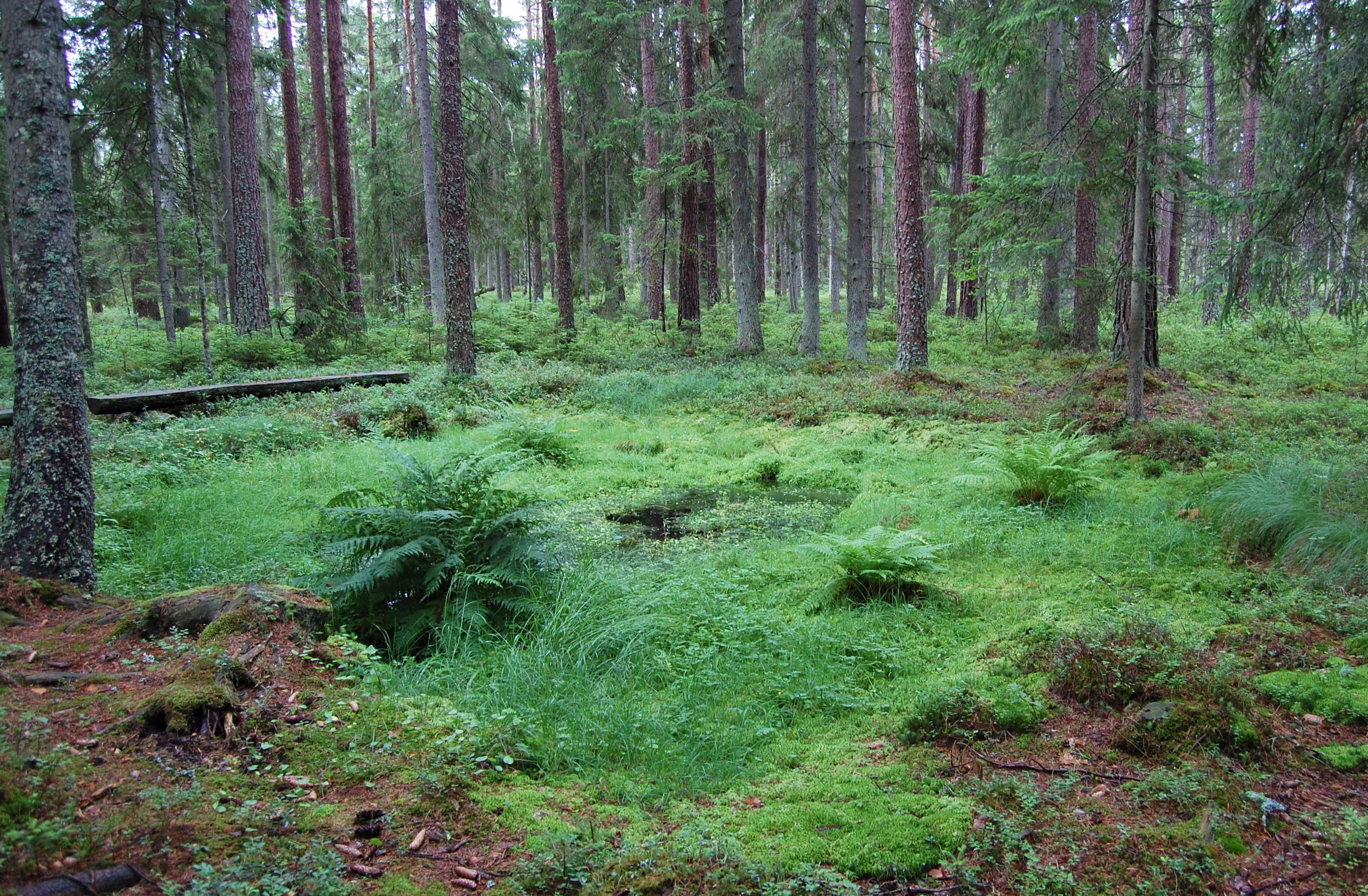 historischer, als Heilbrunnen angesehener Brunnen "Doppebrunnen" in Schweden